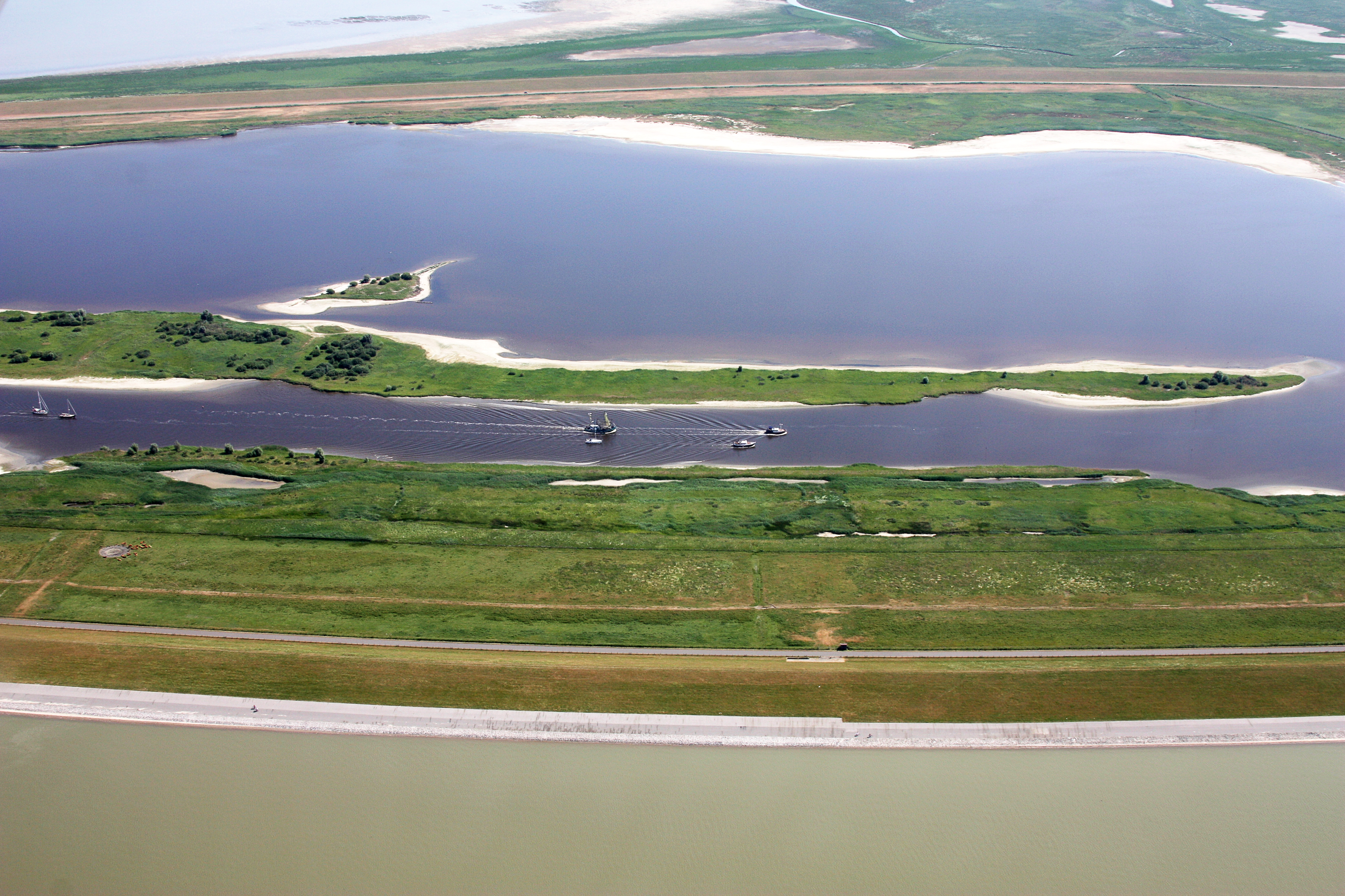 Flug Pilsumer Leuchtturm nach Borkum; Flughöhe 1500 ft; Juli 2010; Originalfoto nachbearbeitet: Tonwertkorrektur und Bild geschärft mit Hochpassfilter